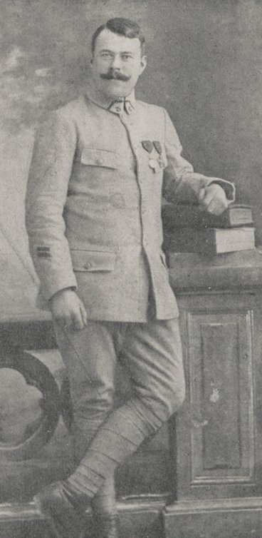 Le Caporal SIVIDRE de la 5e Cie, qui le 26 Septembre 1918 à la prise du village de Laffaux par le 2e Bataillon du 3e Régiment d'Infanterie a seul capturé 1 officier et 22 soldats allemands.